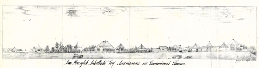 AskaniaNova02.png: Вид Асканії Нової, 1847